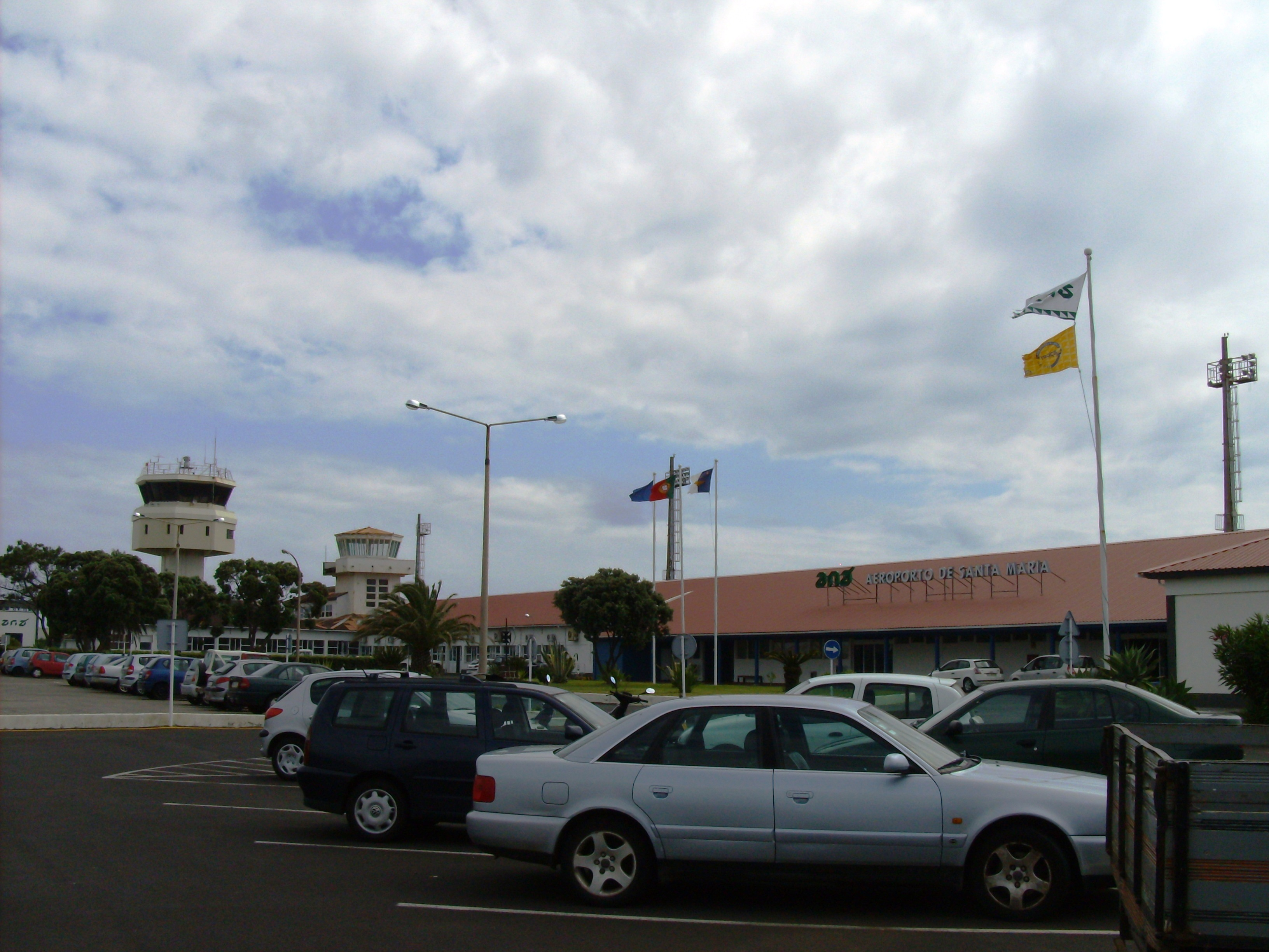 Aeroporto de Santa Maria, Ilha de Santa Maria (Açores), Portugal.